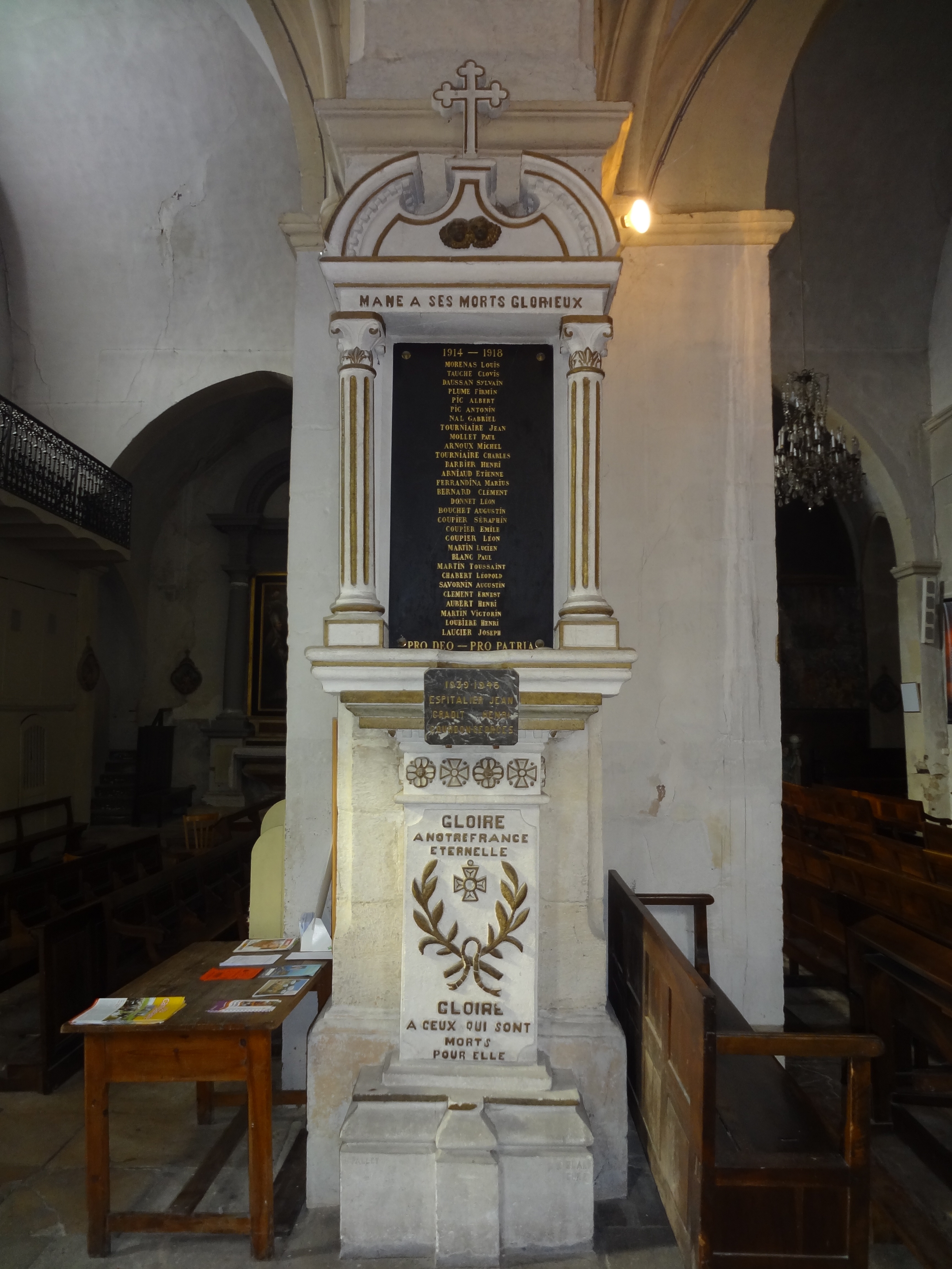 Monument aux morts de la Première Guerre mondiale dans l’église Saint-André de Mane